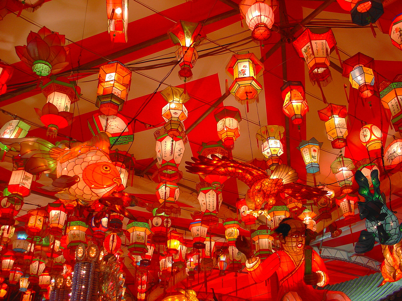 Nagasaki Lantern Festival.(Nagasaki City, Nagasaki Prefecture, Japan)